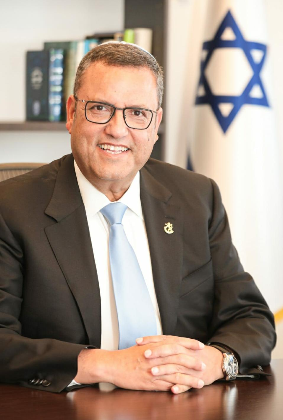 ראש העיר ירושלים, משה ליאון